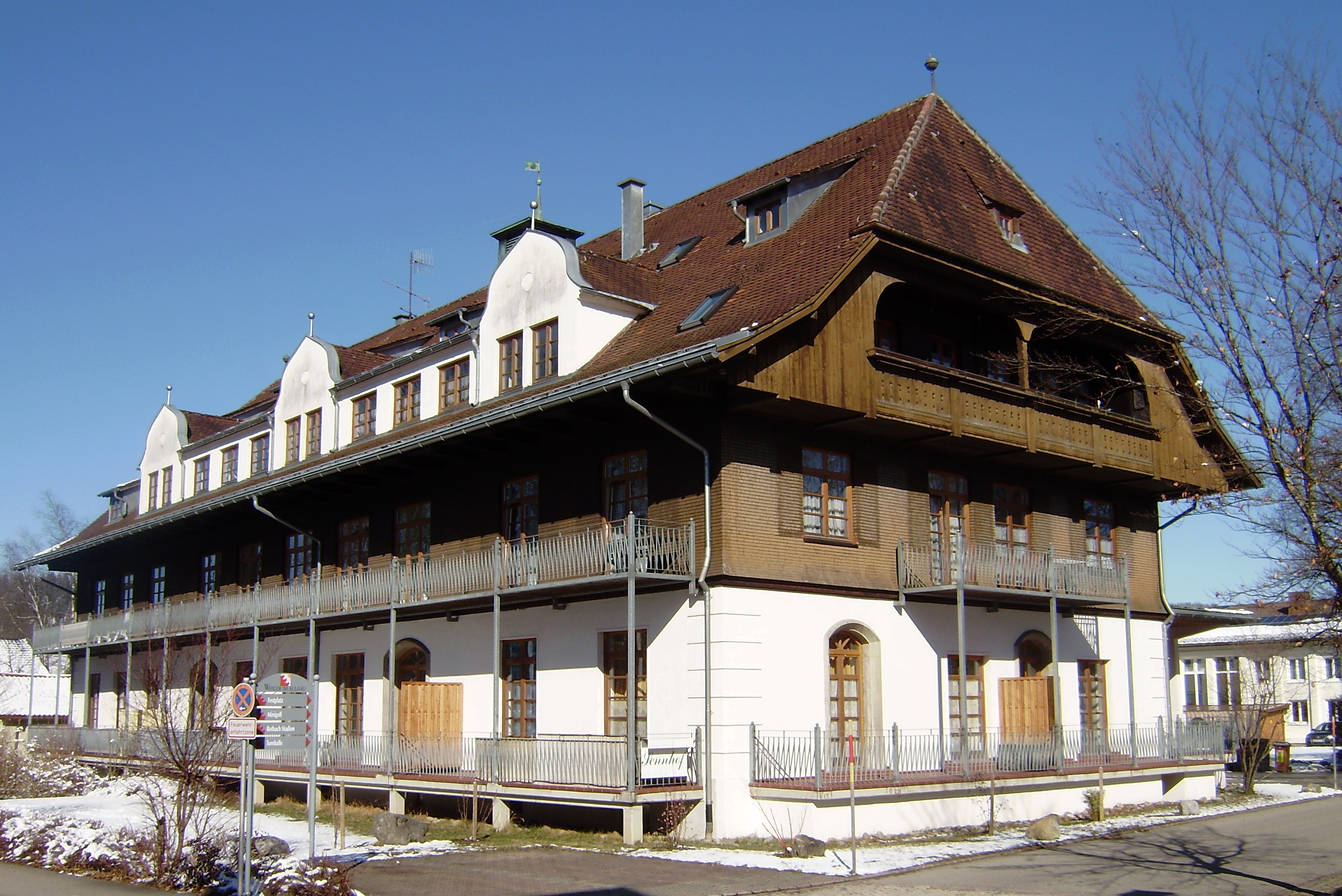 Sennhof; 1929/1930 vom Marktbaumeister Georg Bufler errichtetes Schulgebäude der Lehr- und Versuchsanstalt für Emmentalkäserei (mit Wohnräumen für die angehenden Sennen im Obergeschoss); später Dr.-Anton-Fehr-Schule; Weiler im Allgäu, Fridolin-Holzer-Straße 40; Lehreinrichtung 1890 gegründet, 1902-1910 nach Sonthofen ausgelagert, bestand bis 1970. Originalbild wurde am 23. Oktober 2008 versehentlich nach geladen und am gleichen Tag von Benutzer:Marsipulami durch Abschneiden unschöner Schatten im Vordergrund verbessert